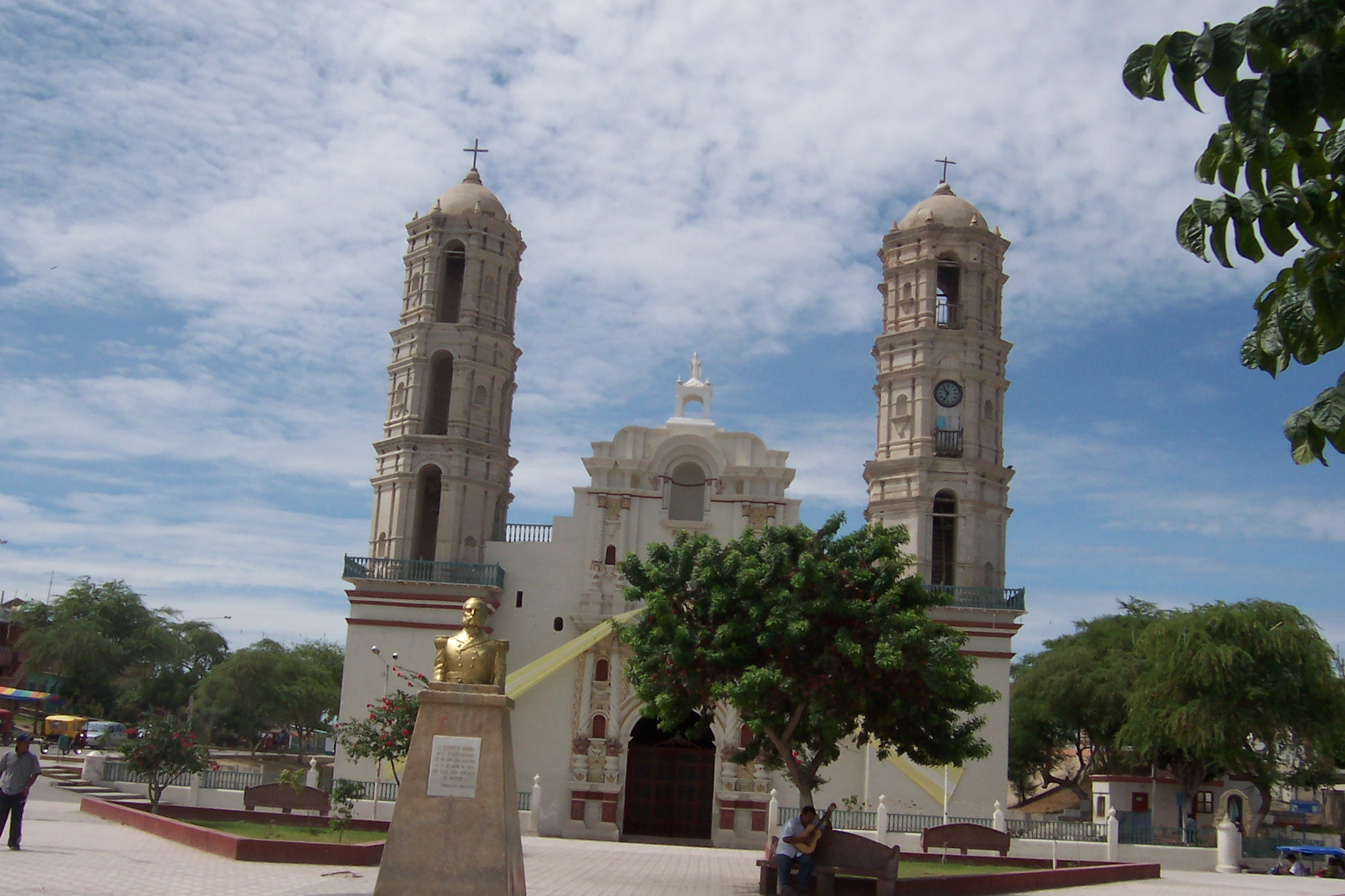 Catedral de Sechura, en el norte del Perú, tambien conocida como la Catedral de la Arena, a rais de la abundancia de arena existente en el desierto de Sechura que rodea toda la ciudad. La catedral de Sechura es la iglesia mas antigua de Piura y una de las mas antiguas del Perú. Su antiguedad se debe a la pesca que es la actividad ancentral. Cuando los Españoles invadieron el puerto de bayovar, parachique, playa blanca y demas playas ricas en pescados, mariscos y moluscos. El monumento que se encuentra en el centro de la plaza de armas es el Contralmirante y heroe nacional Miguel Grau Seminario, tambien conocido como el " Caballero de los mares " , quien defendio el mar peruano a costa de su propia vida en su monito Huascar en la guerra del pacifico.